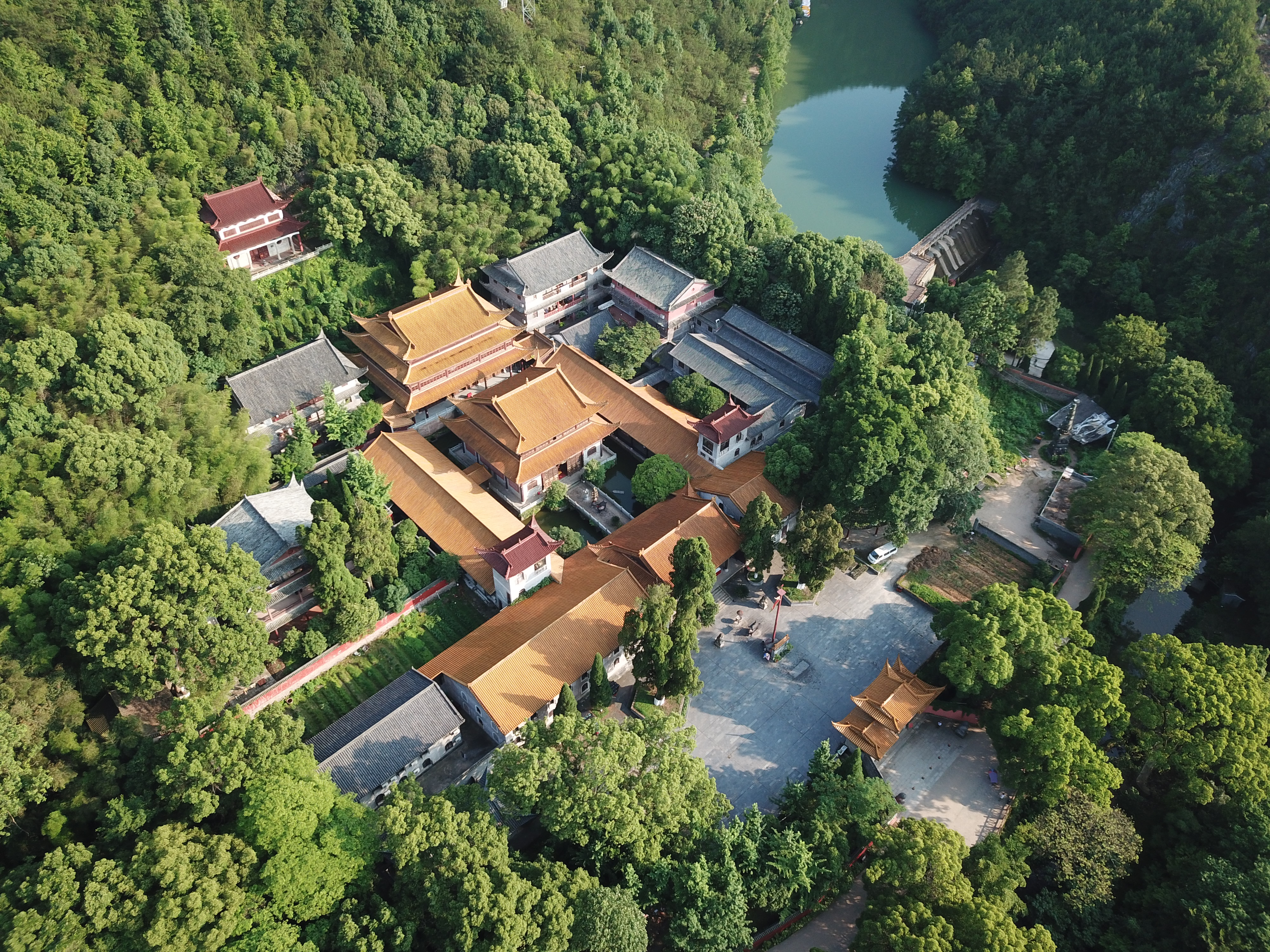 净居寺